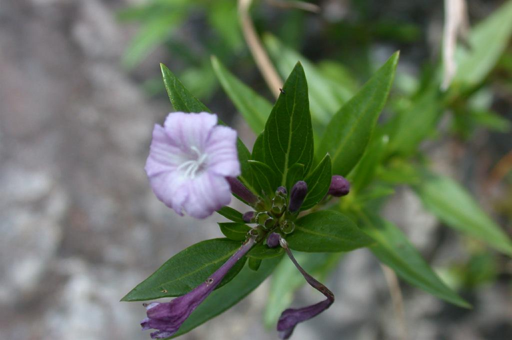 Leptodermis pulchella：シチョウゲ 2002/08/5 和歌山県北山村：Kitayama Village Wakayama Pref.